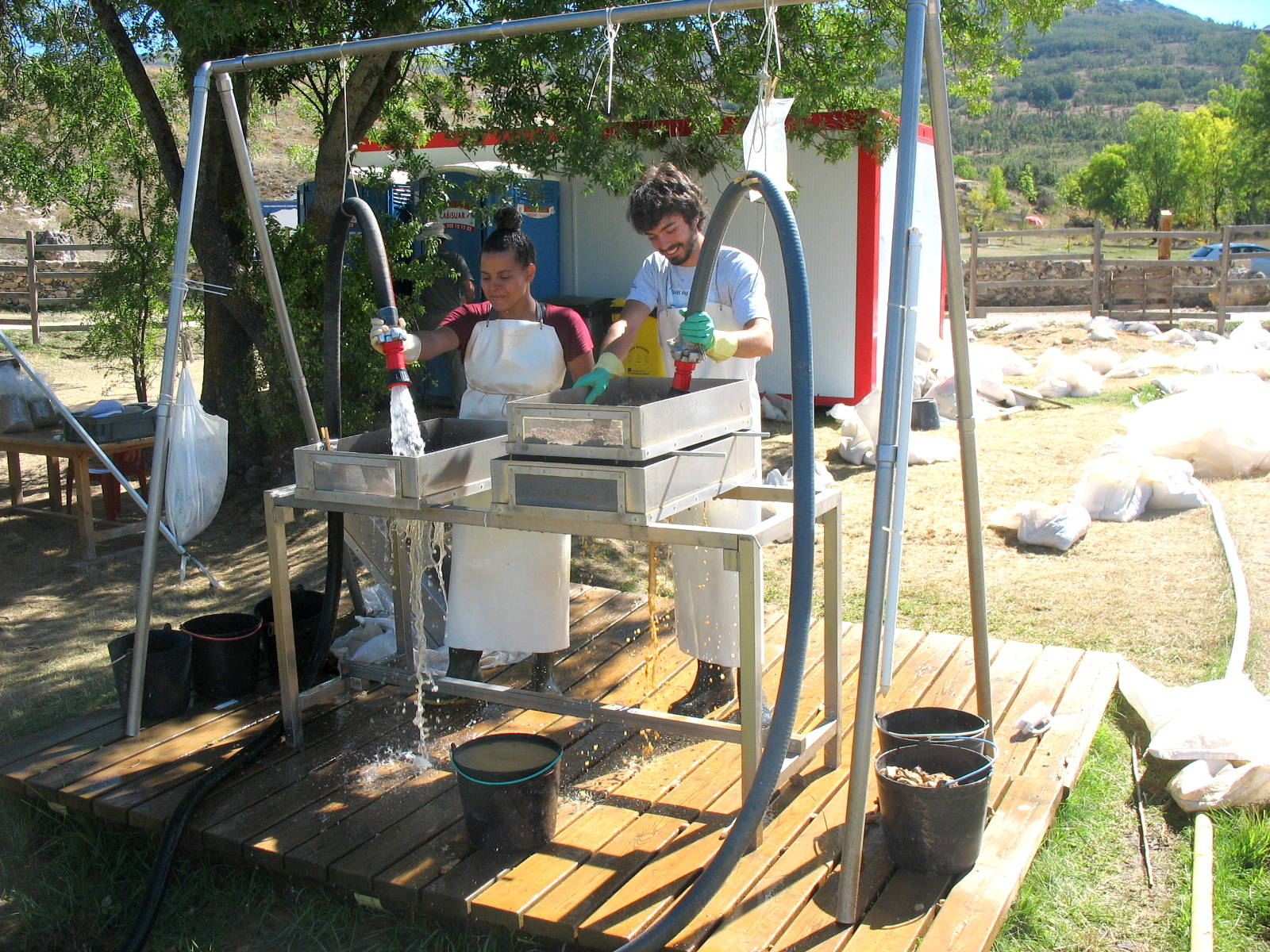 Lavado/tamizado de muestras de los yacimientos del Calvero de la Higuera (Pinilla del Valle, Madrid, España). Campaña de 2015